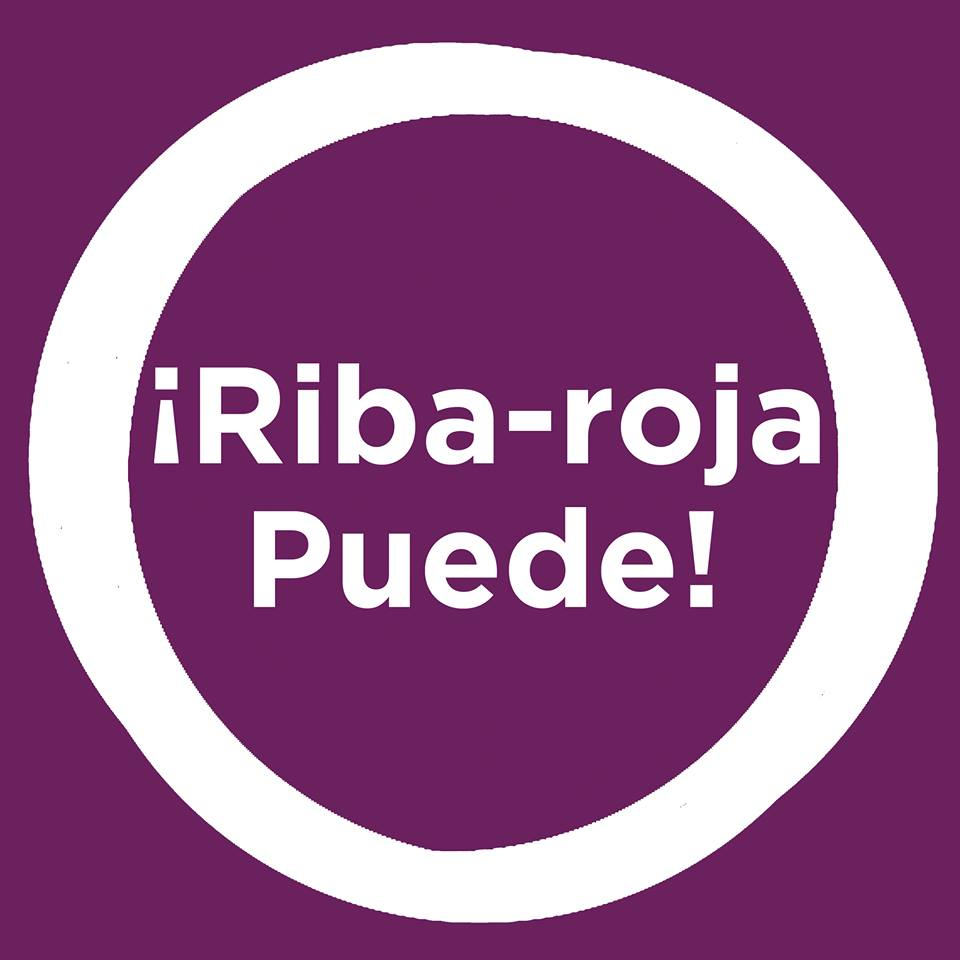 Logo de Riba-roja Puede